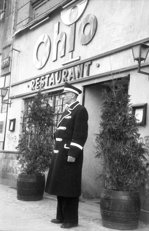 ADN-ZB Berlin 1948: Portier vor der Ohio-Bar. 28.7.1948